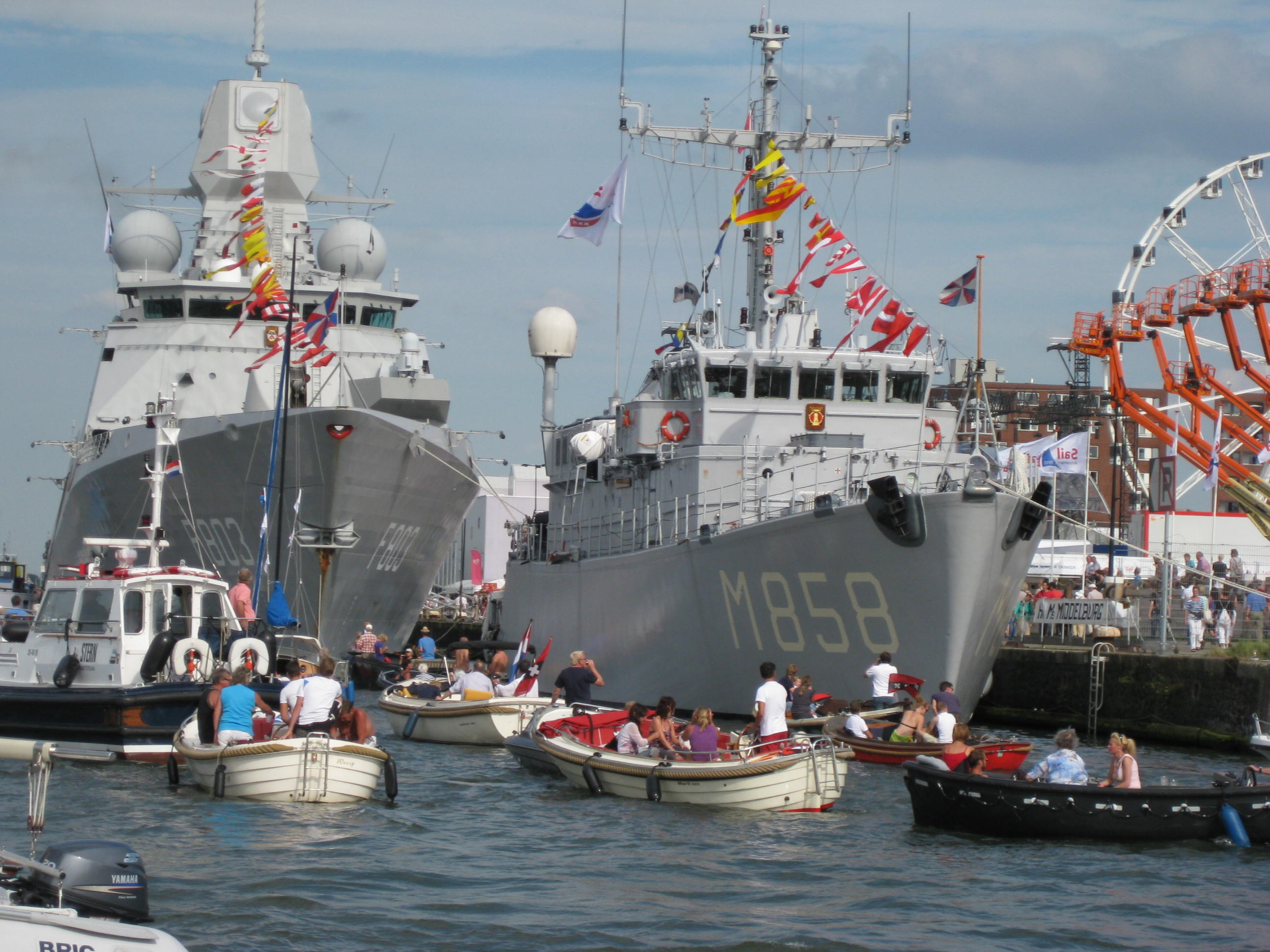 Marineschepen (Tromp en Middelburg) op Sail Amsterdam 2010